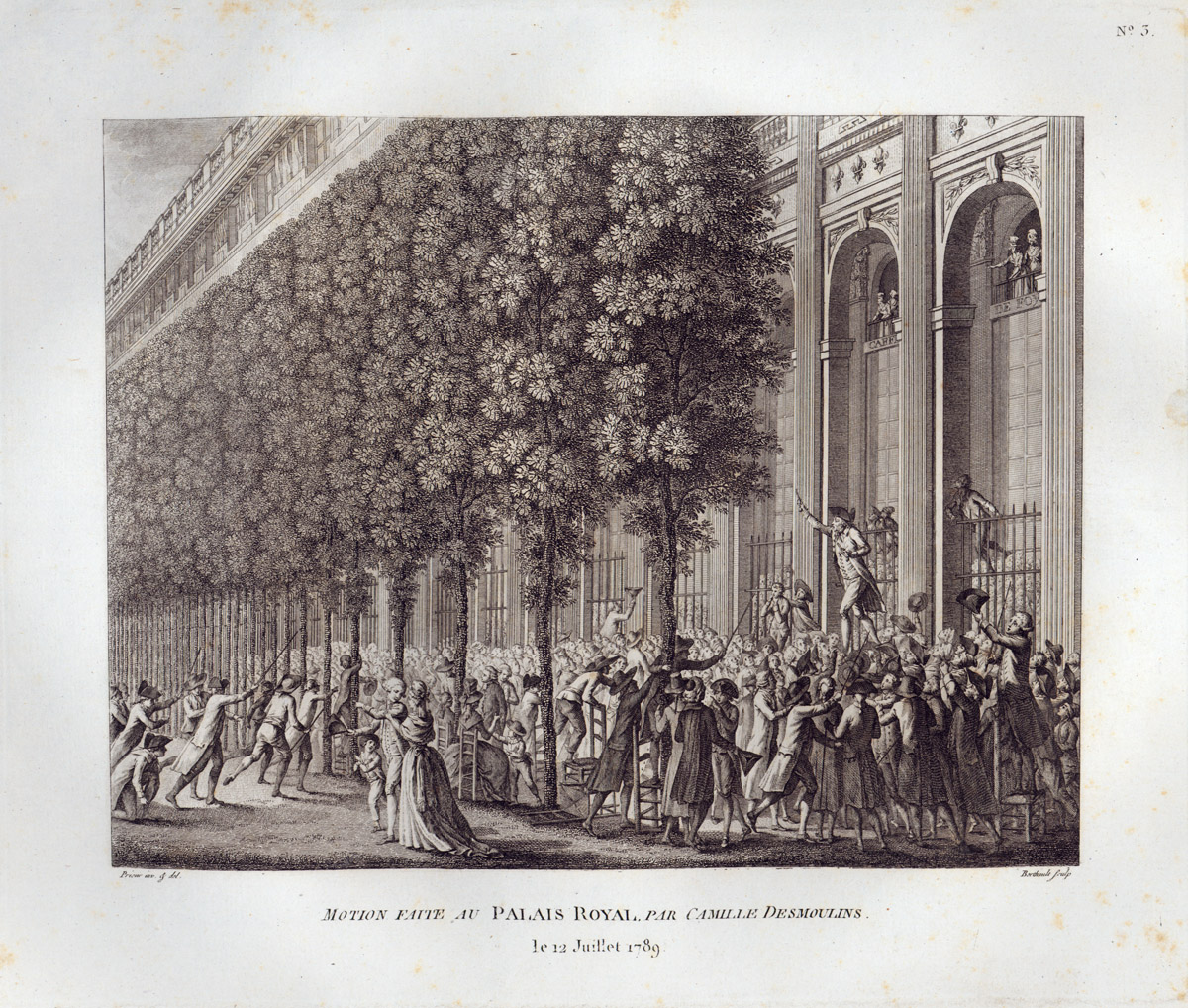 Motion faite au Palais Royal, par Camille Desmoulins, le 12 juillet 1789.